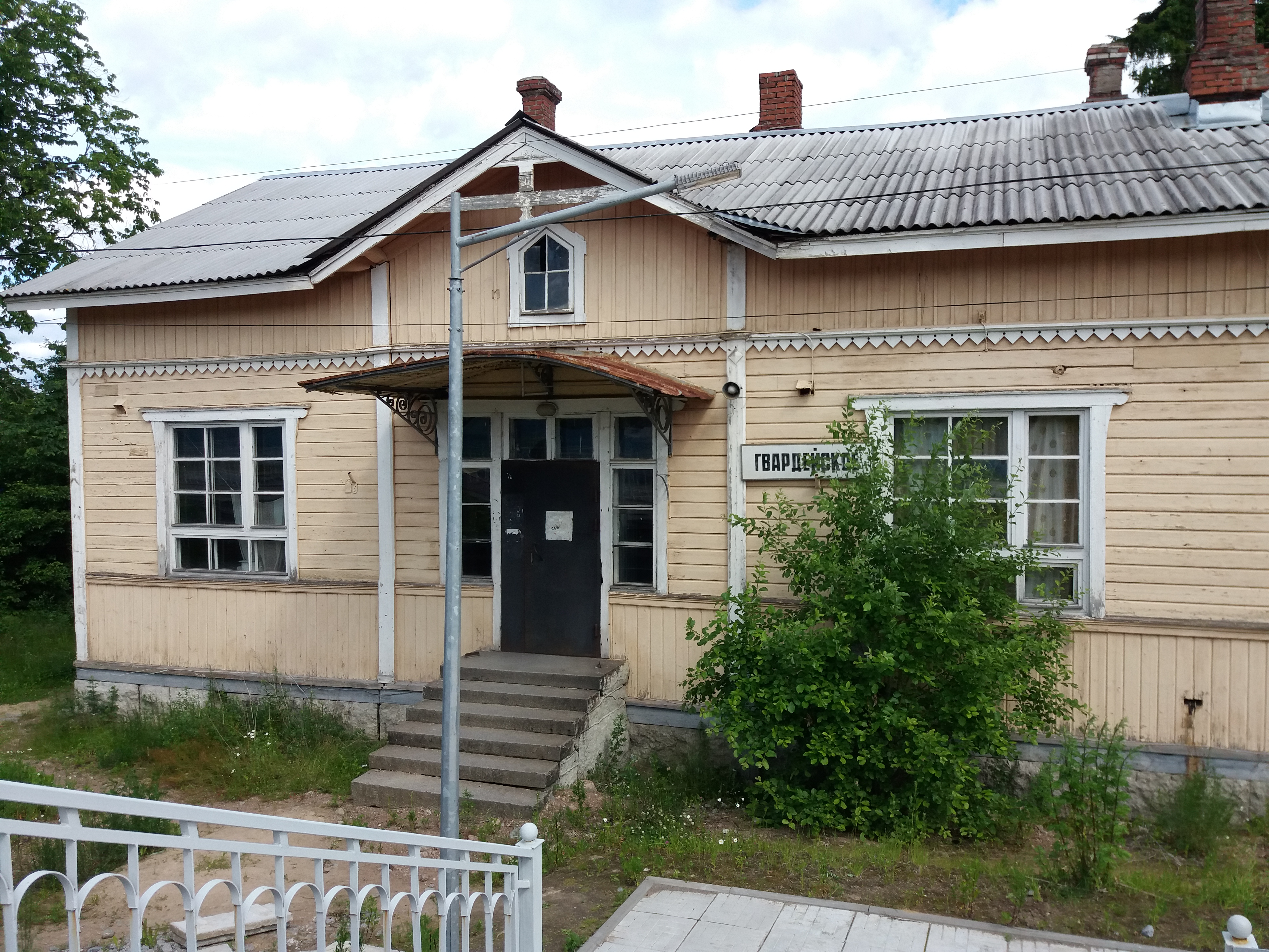 Karisalmen rautatieasema Viipuri-Joensuu rataosalla Viipurin maalaiskunnassa.Valmistui 1897 Bruno Granholmin piirustusten mukaisesti. Asemalaituri on uusi ja itse asemarakennus ei ole ollut pitkään aikaan käytössä mutta on asemarakennus on kestänyt kunnostamattomana kiitettävän hyvin.Paikallisjunat edelleen pysähtyvät asemalla tarvittaessa.